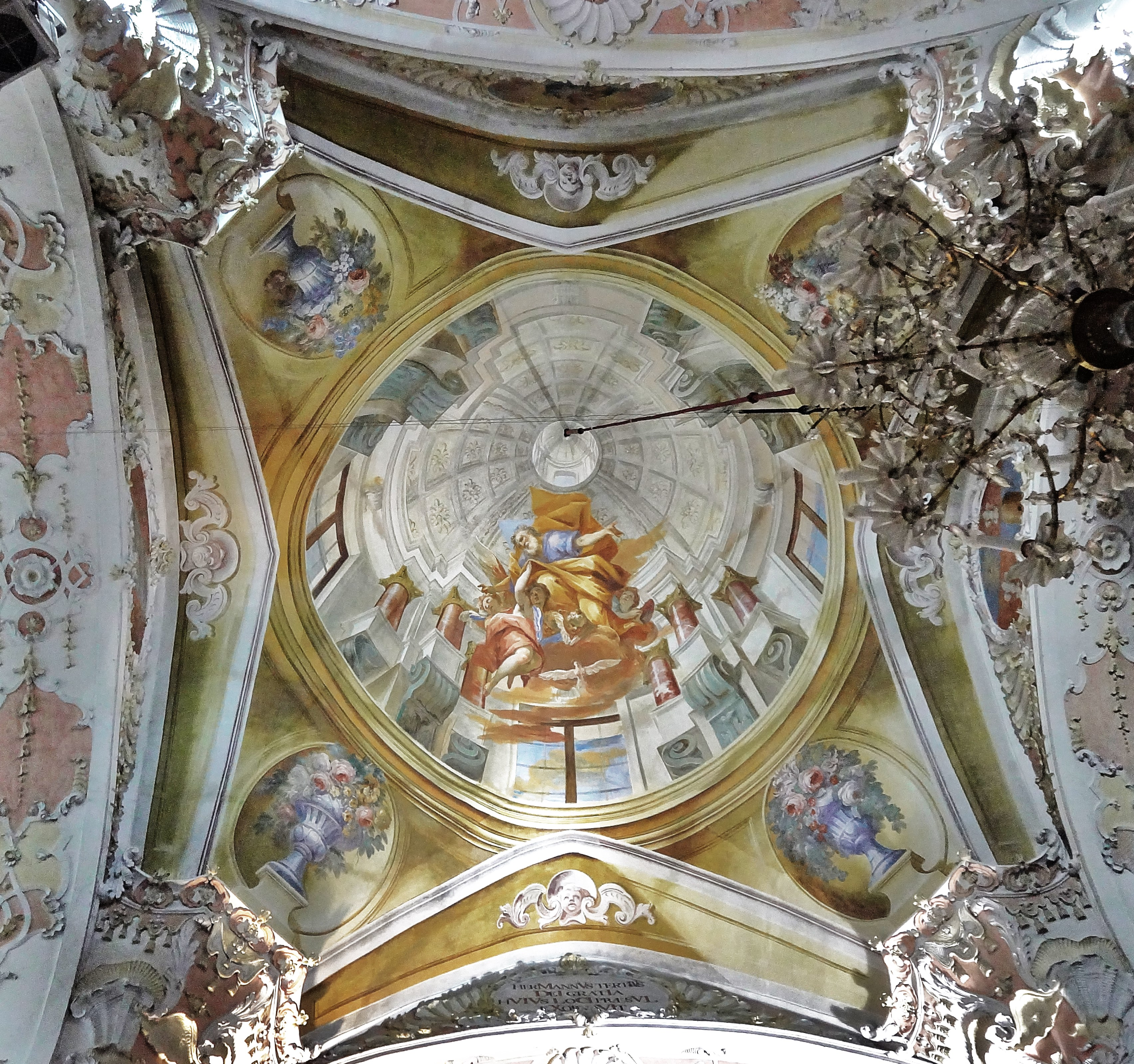 Stiftskirche Ossiach, Scheinkuppel im Gewölbe der Vierung